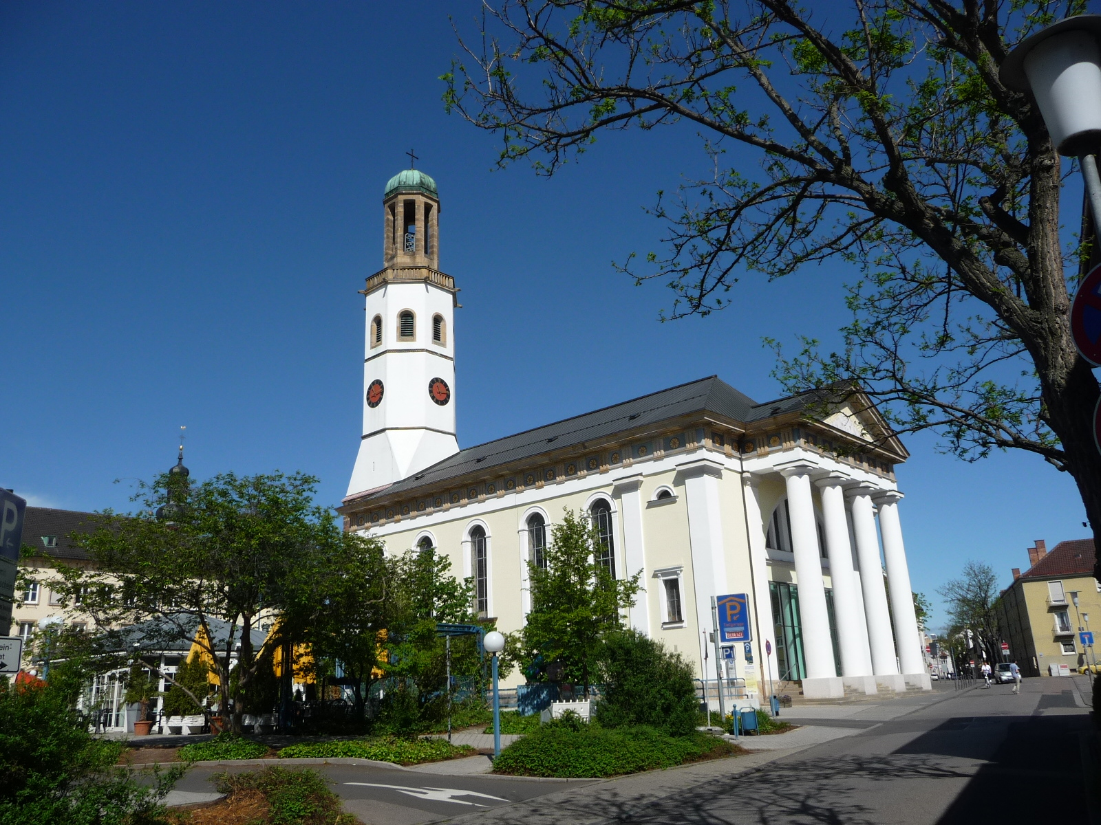 Zwölf-Apostel-Kirche (Frankenthal)